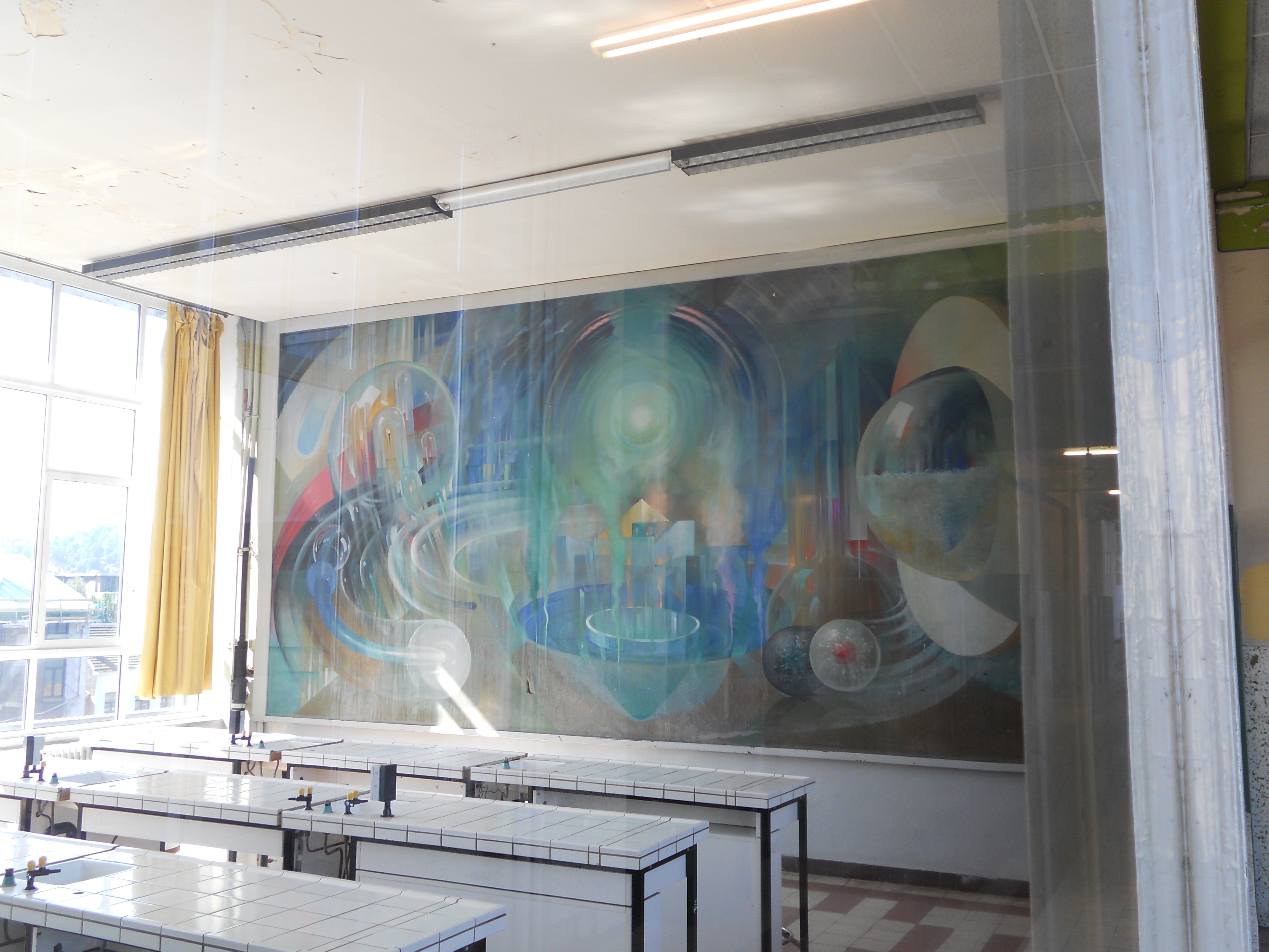 Peintures réalisée par Fernand Sterven représentant la chimie .